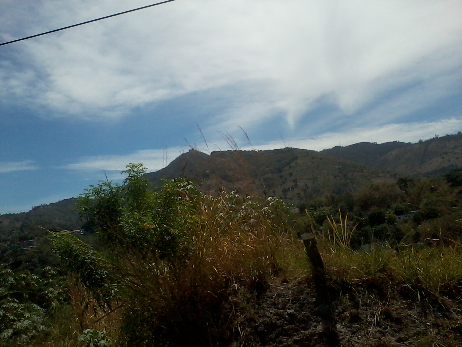 Delgado, San Salvador, El Salvador